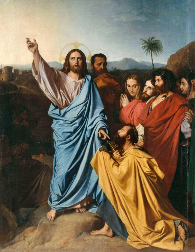 Jesus übergibt Petrus die Schlüssel des Paradieses